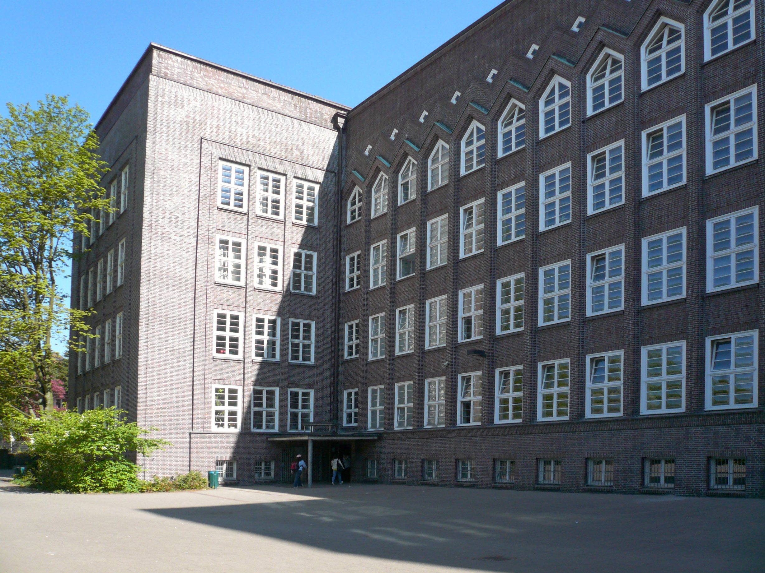 Gesamtschule Eppendorf -Högerbau Curschmannstraße- Westseite / Hof